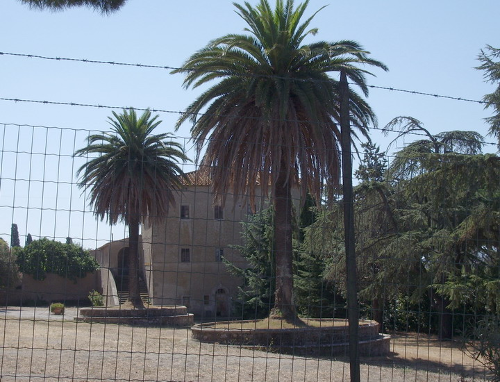 La tenuta e la fattoria di Collecchio nel comune di Magliano in Toscana (GR)